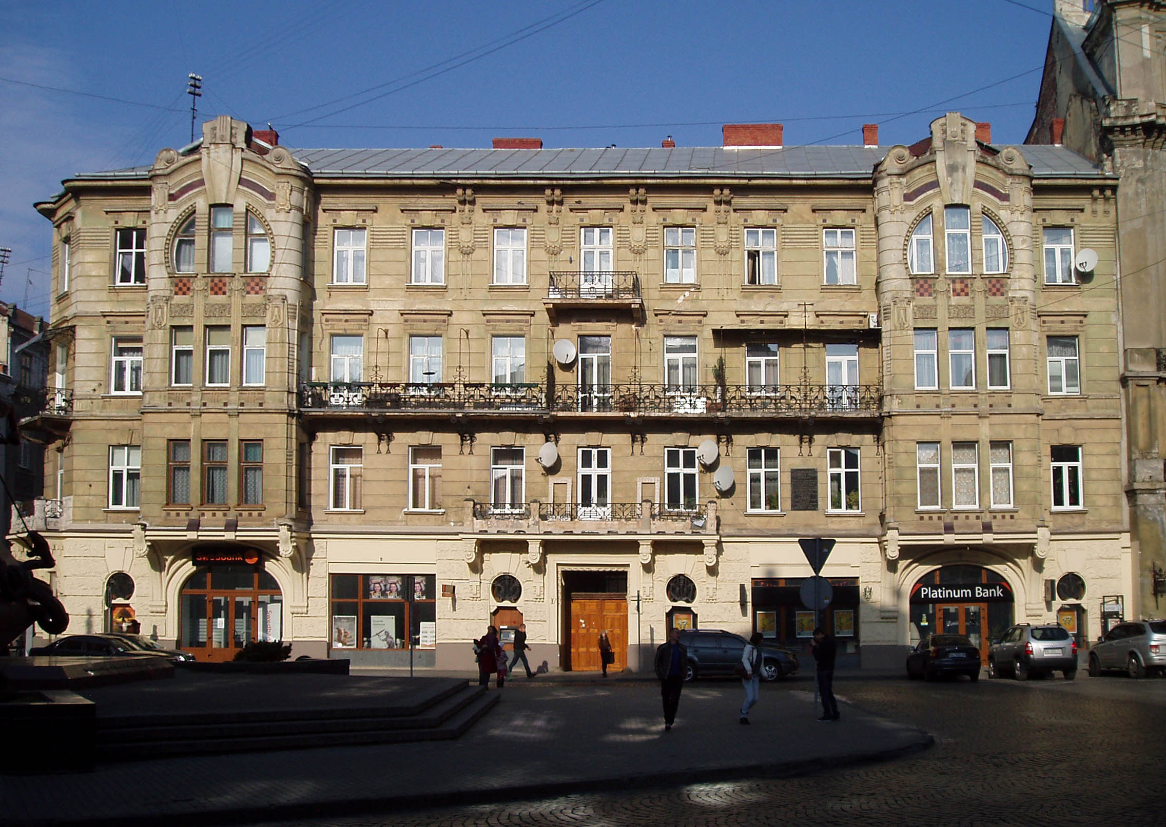 Будинок в стилі сецесії на площі Генерала Григоренка у Львові. Збудований 1907 року. Архітектор Тадеуш Обмінський (1874—1932).